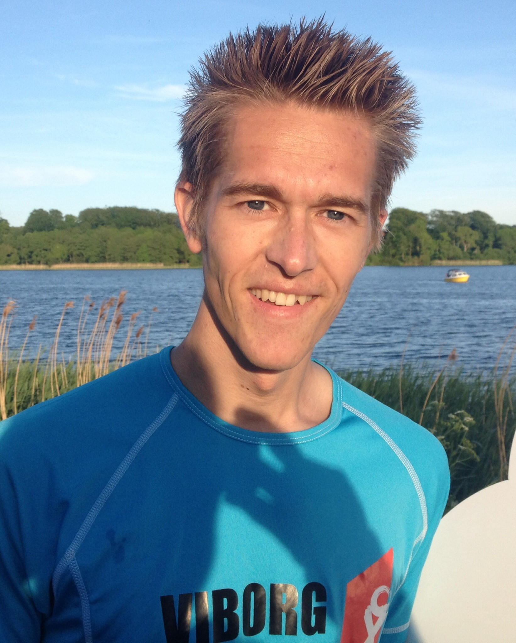 Jesper Faurschou, dansk atlet. Her efter Søndersøløbet 2014 i Viborg.